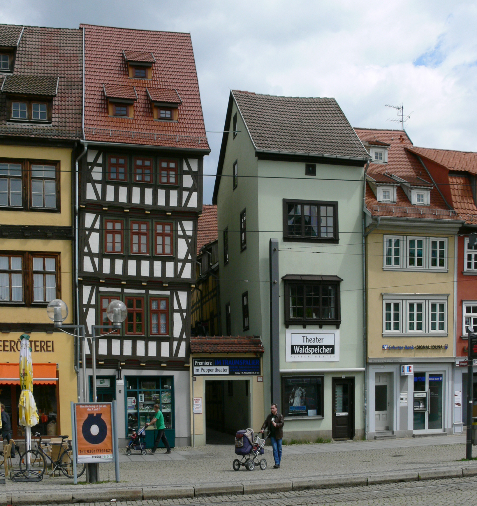 Durchgang zur Mettengasse vom Domplatz aus gesehen. Rechterhand die Theaterkasse des Theater Waidspeicher in Erfurt.